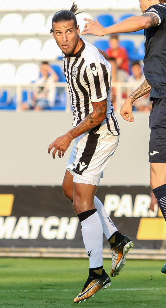 Олимпик - ПАОК 1:1